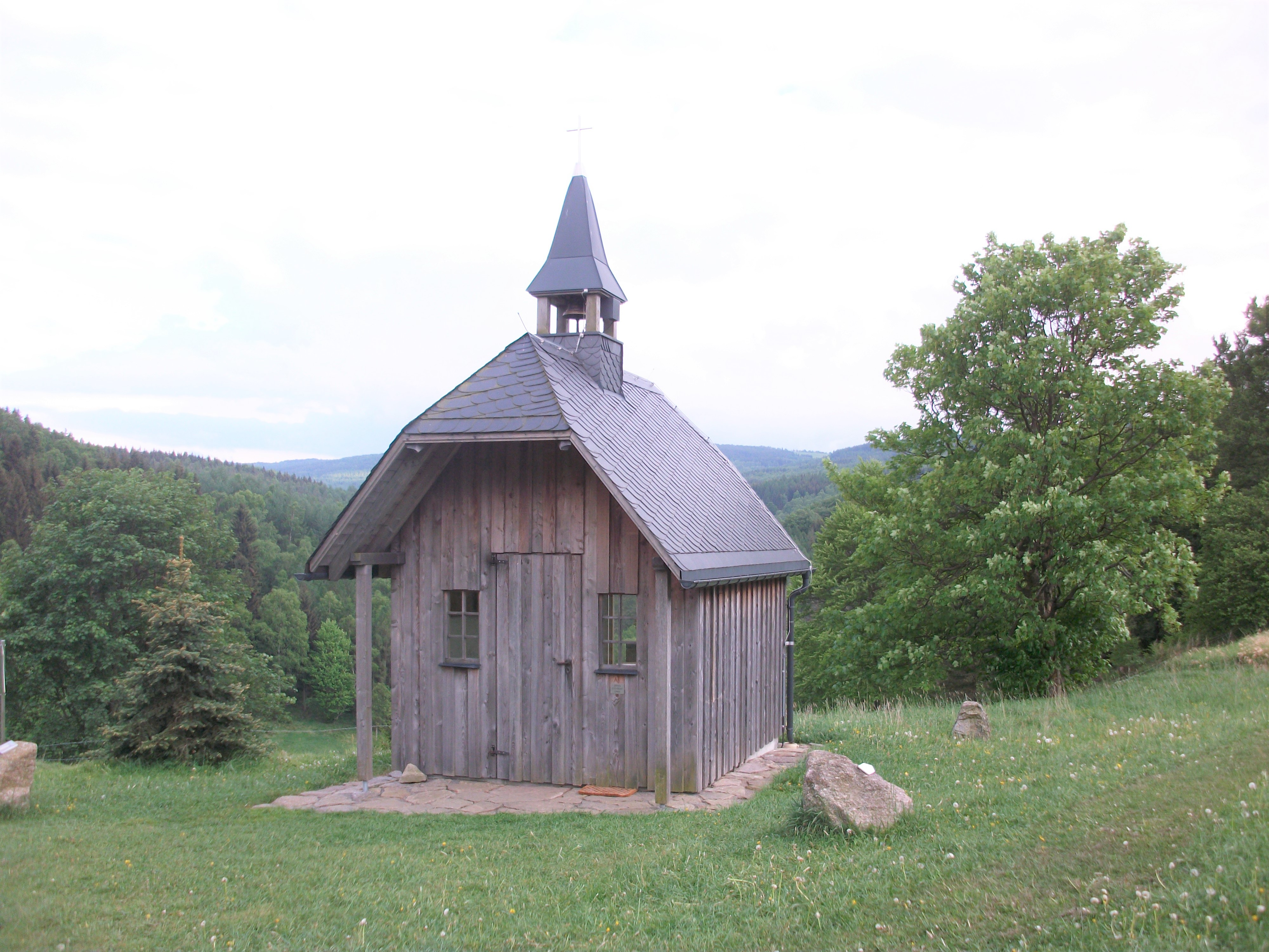 Glockenwanderweg, Station 11 Kapelle am Weg in Oberlochmühle